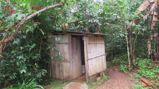 Mertuto